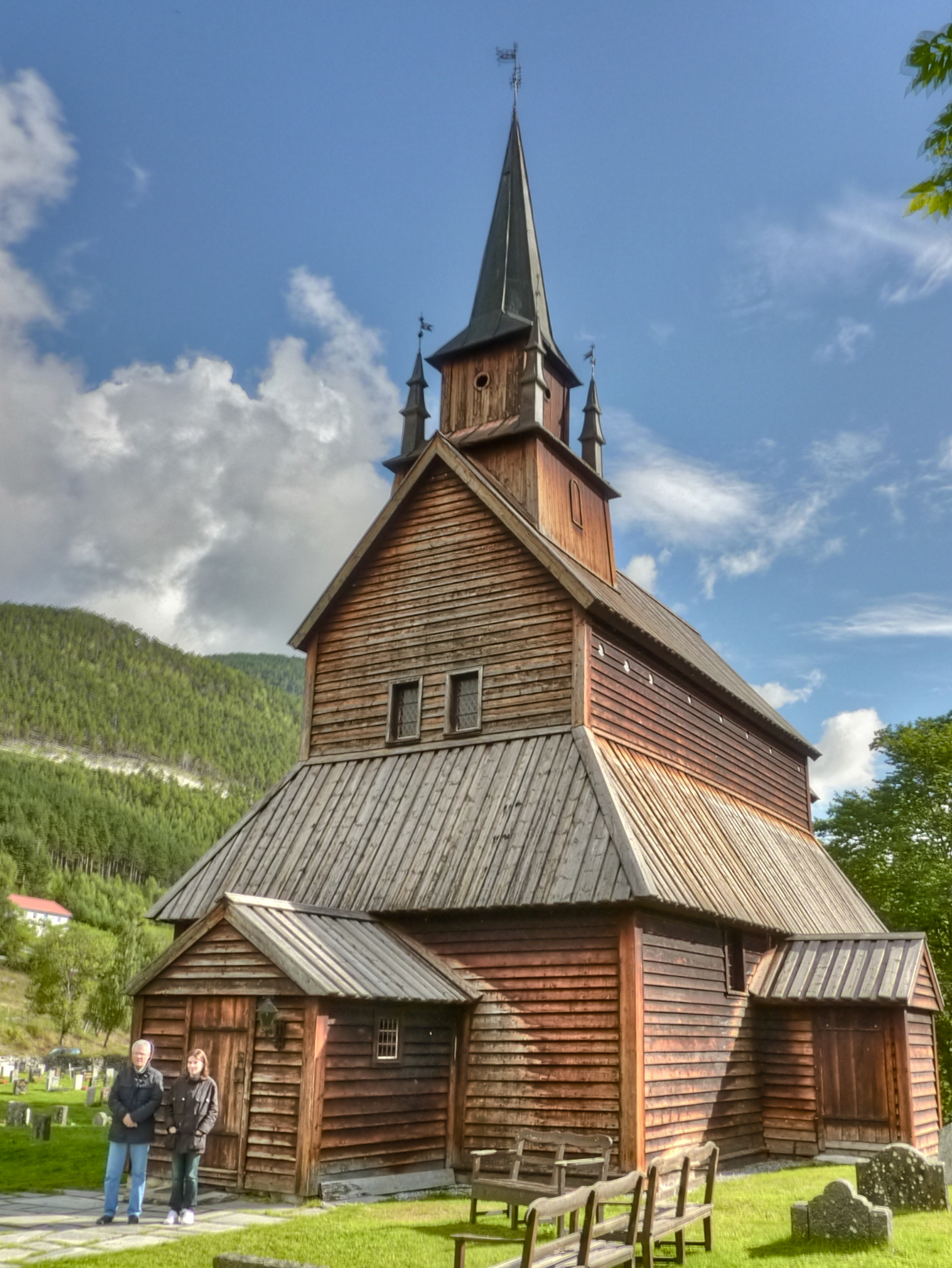 Iglesia de madera. Taken in Nessane, Sogn og Fjordane Fylke